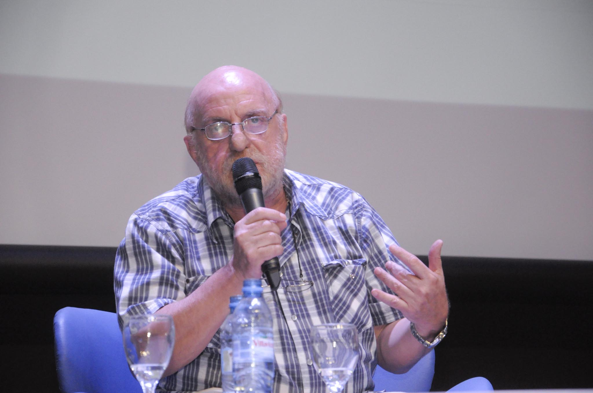 Horacio dando una charla en la universidad metropolitana para la educación y el trabajo